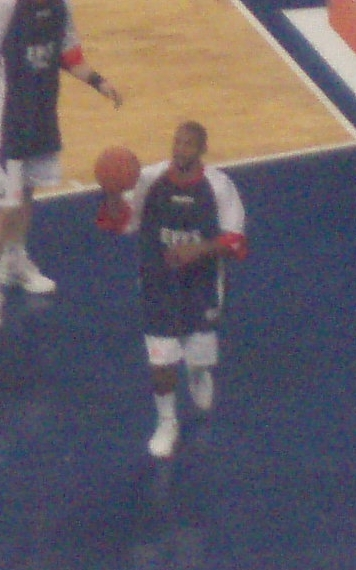 Scoonie Penn. PAO-EFES